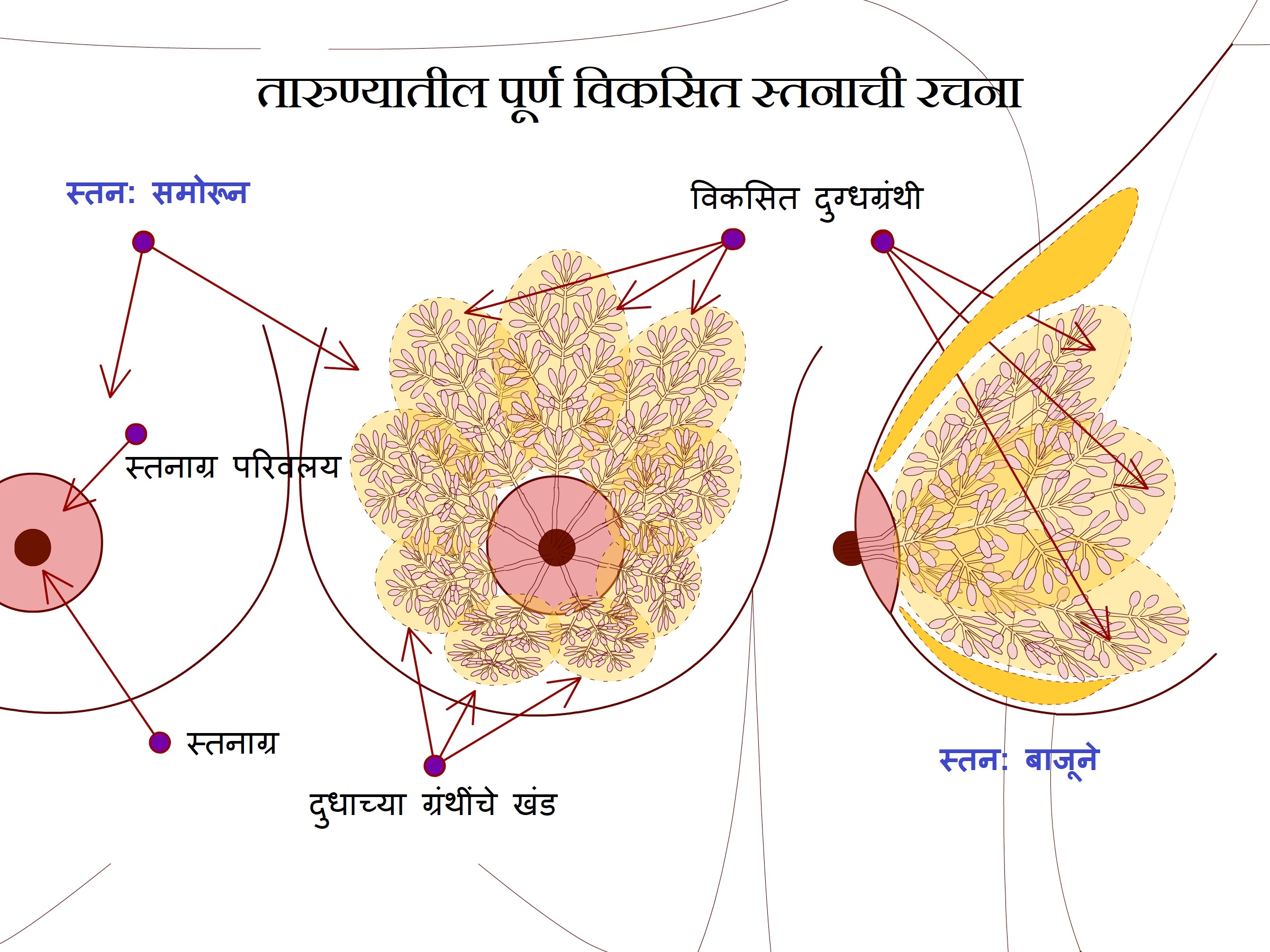 तारुण्यातील पूर्ण विकसित स्तनाची रचना समोरून आणि बाजूने दाखवणारी योजनाबद्ध आकृती. दुग्धग्रंथींची खंडात्मक रचना, प्रत्येक खंडातून निघणार्‍या व स्तनाग्रावर स्वतंत्रपणे उघडणार्‍या दुग्धनलिका